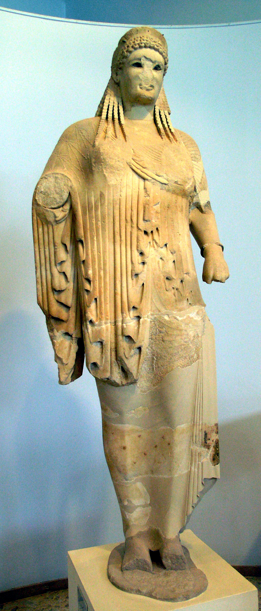 Statue d'une korè plus grande que nature, en marbre de Paros. Elle porte un chiton et un himation, et un diadème avec des méandres peints, ainsi que des ornements de bronze sertis dans les cheveux. Ses yeux sont sertis de crystal de roche. C'est une œuvre datée vers 520 av. J.-C. et associée à un chapiteau épigraphique : selon l'inscription, le potier Néarchos à dédié la statue et le sculpteur Anténor l'a réalisée.